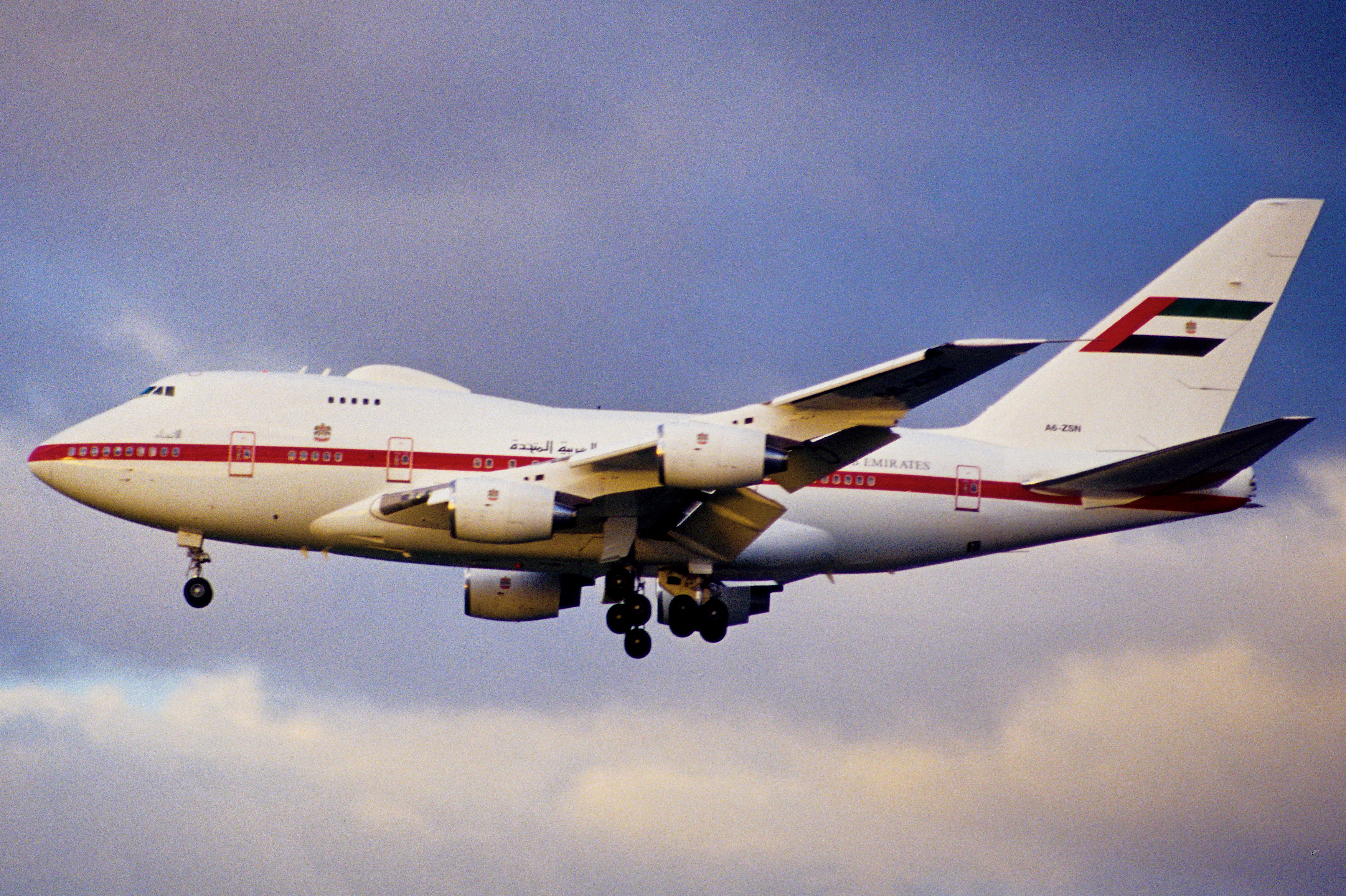 203bm - Abu Dhabi Amiri Flight Boeing 747SP-Z5; A6-ZSN@LHR;23.01.2003